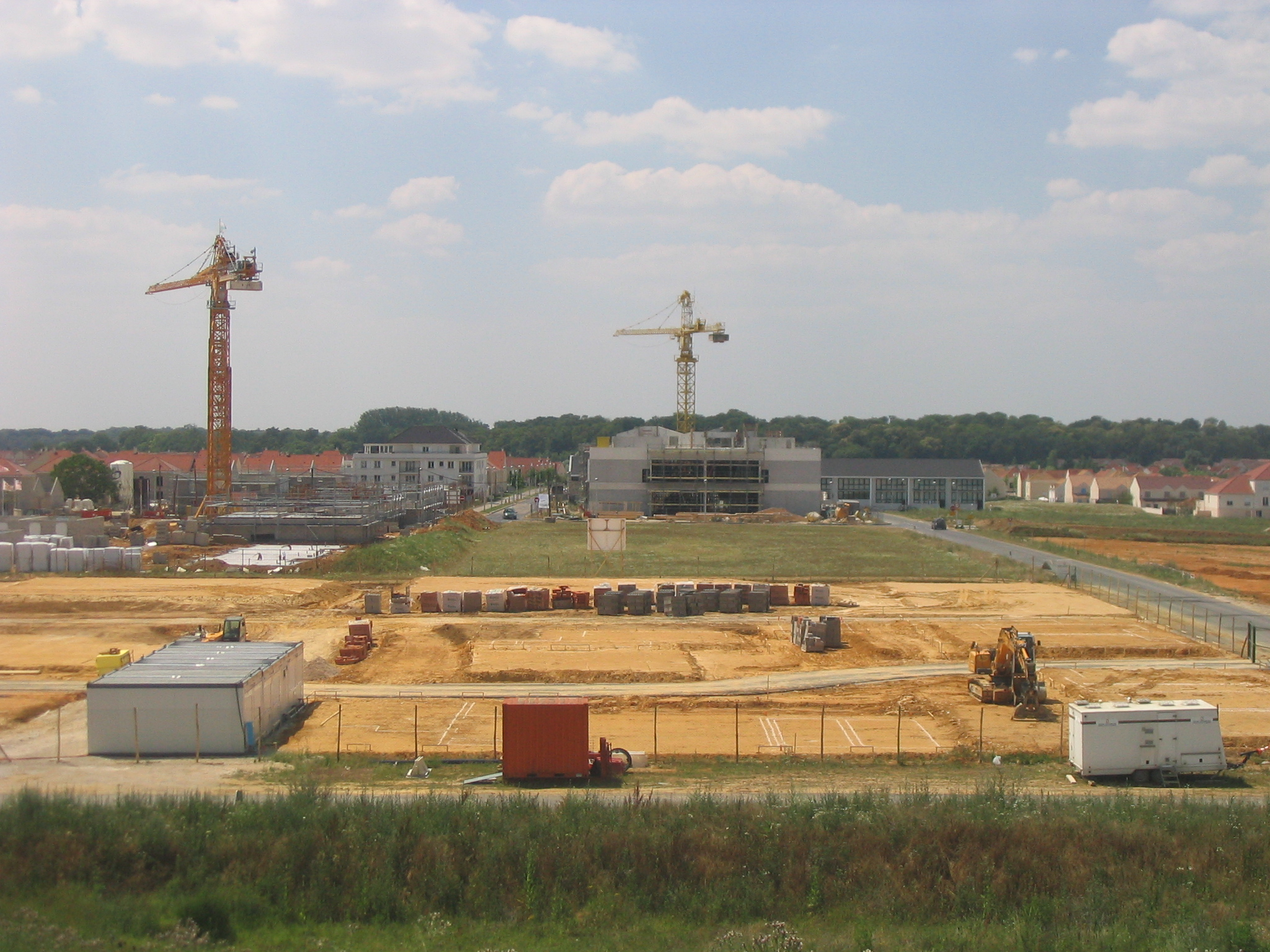 Chantier du quartier des Cités-Unies à Savigny-le-Temple. Etat en juillet 2006. Construction of Cités-Unies quarter(State:July, 1, 2006).